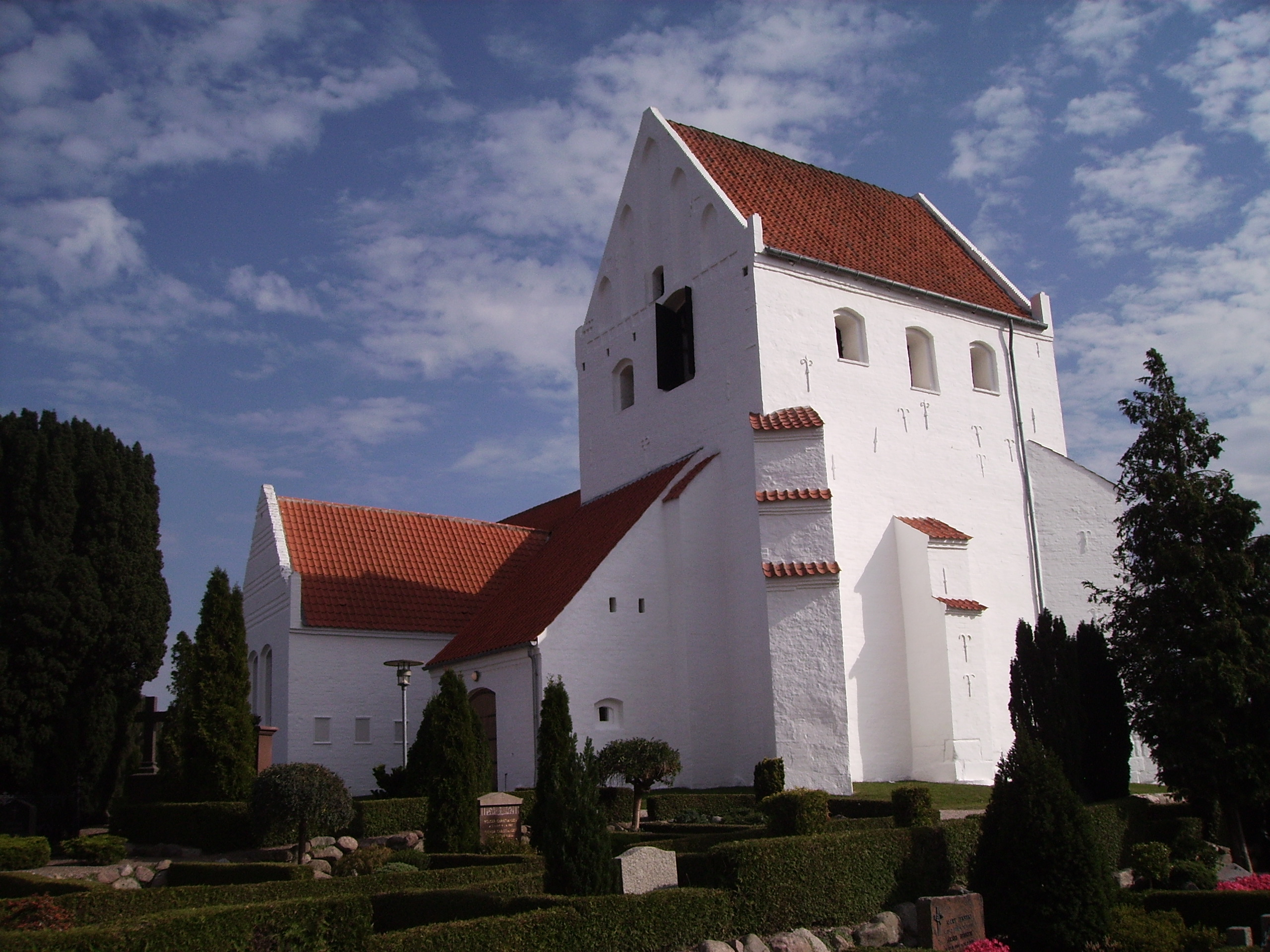 Paarup Kirke fra nordvest, Paarup Sogn, Odense Herred, Odense Amt, Denmark (Danish Church)